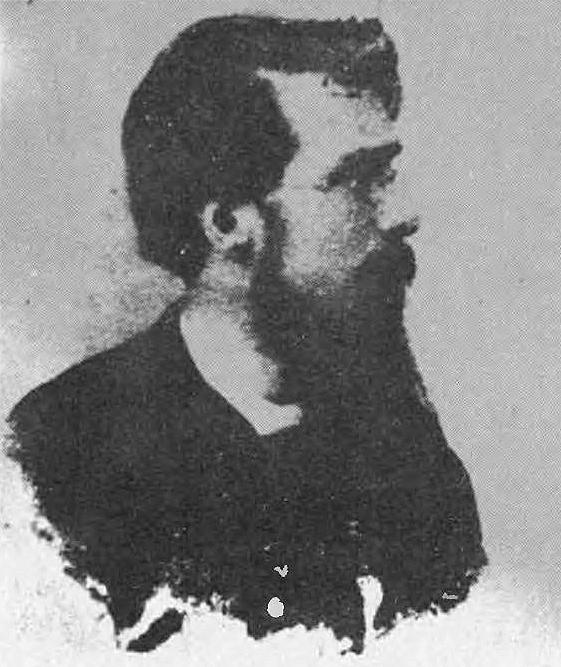 Henryk Arctowski (1871-1958)